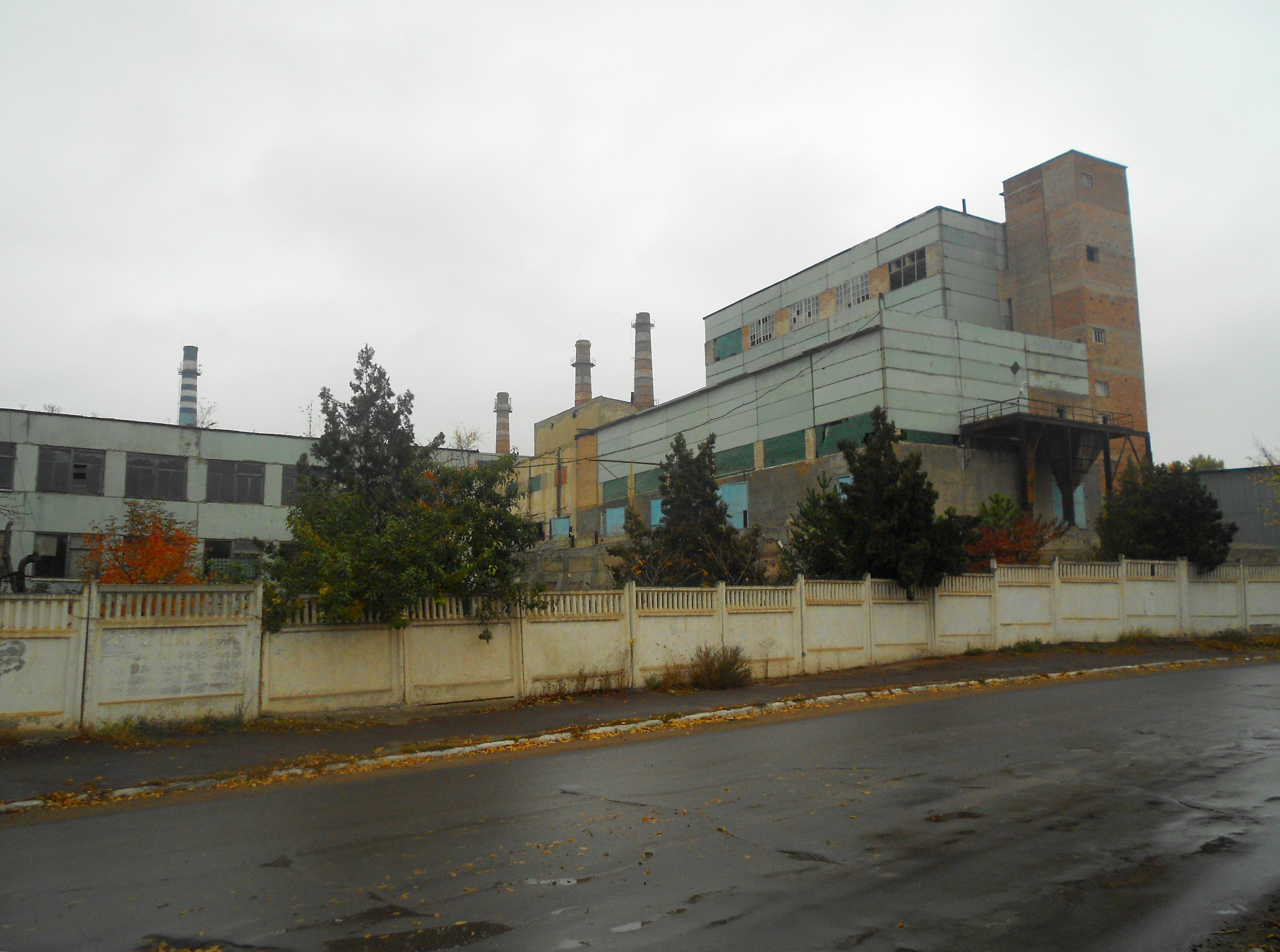 Fabrica de sticlă Cristal Flor din Florești